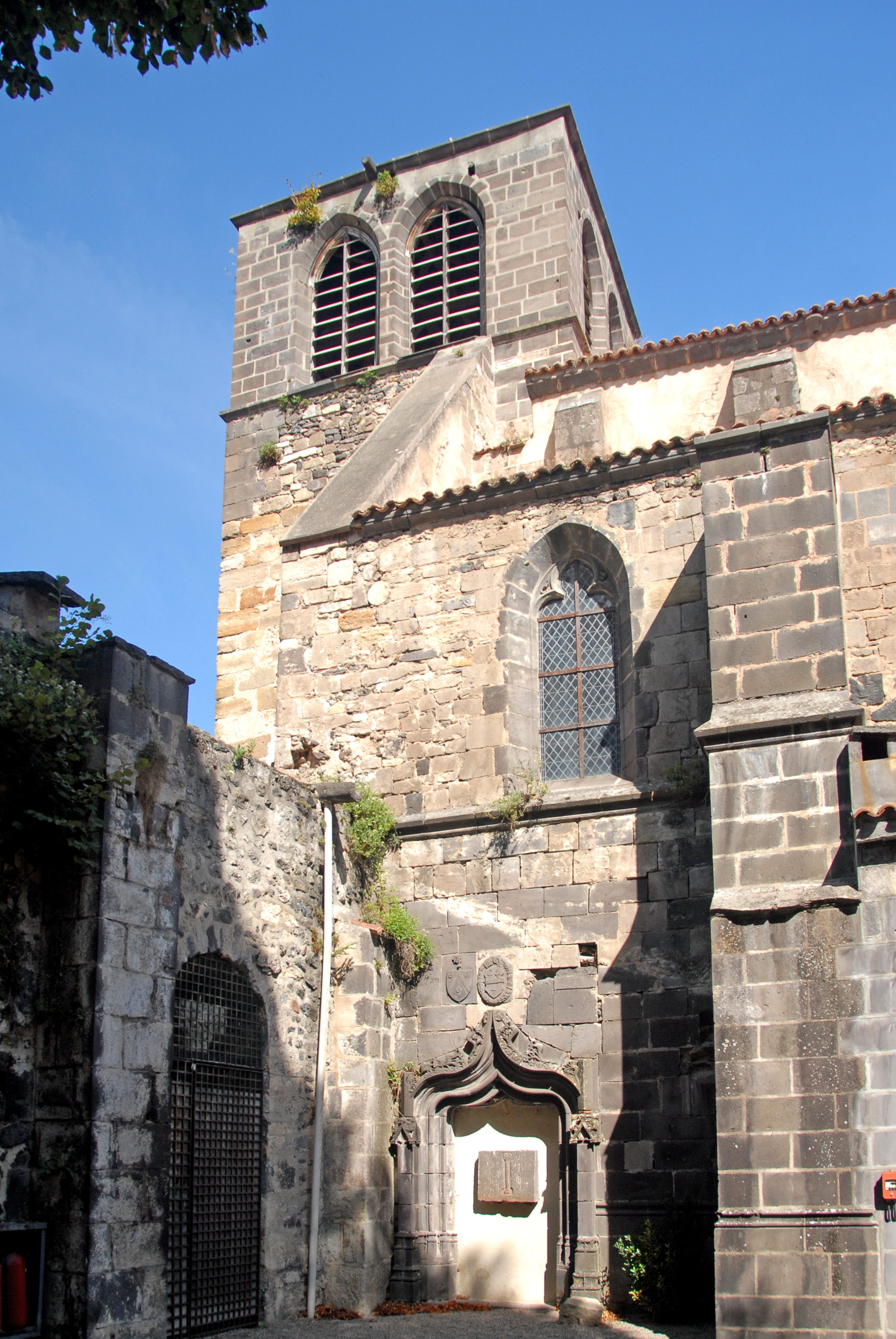 Mozat, Langhaus, 1. Joch und Turm